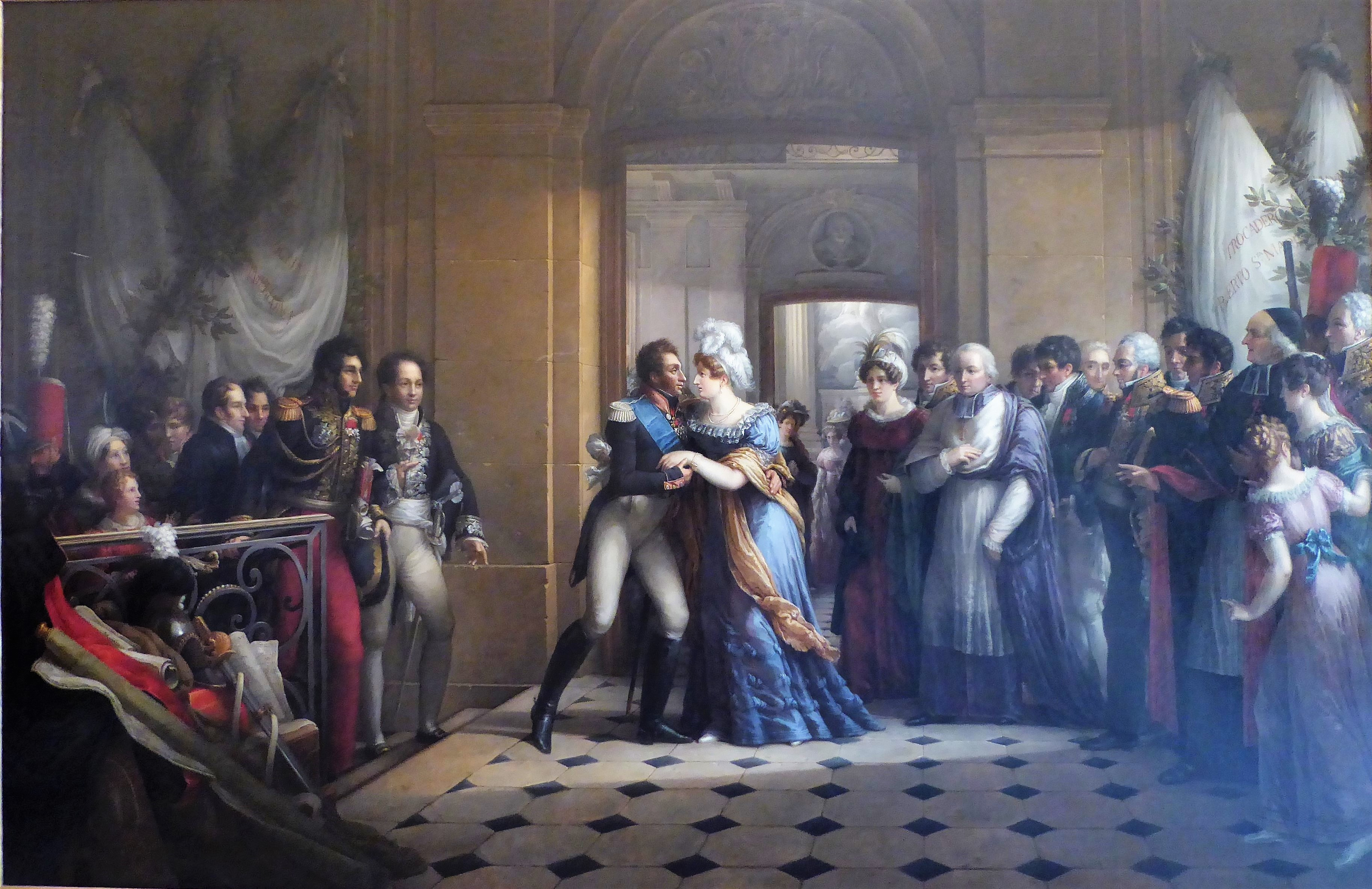 Rencontre du 1er décembre 1823 au palais épiscopal de Chartres, aujourd'hui musée des beaux-arts. Derrière le couple, la salle à l'italienne et la chapelle du palais.